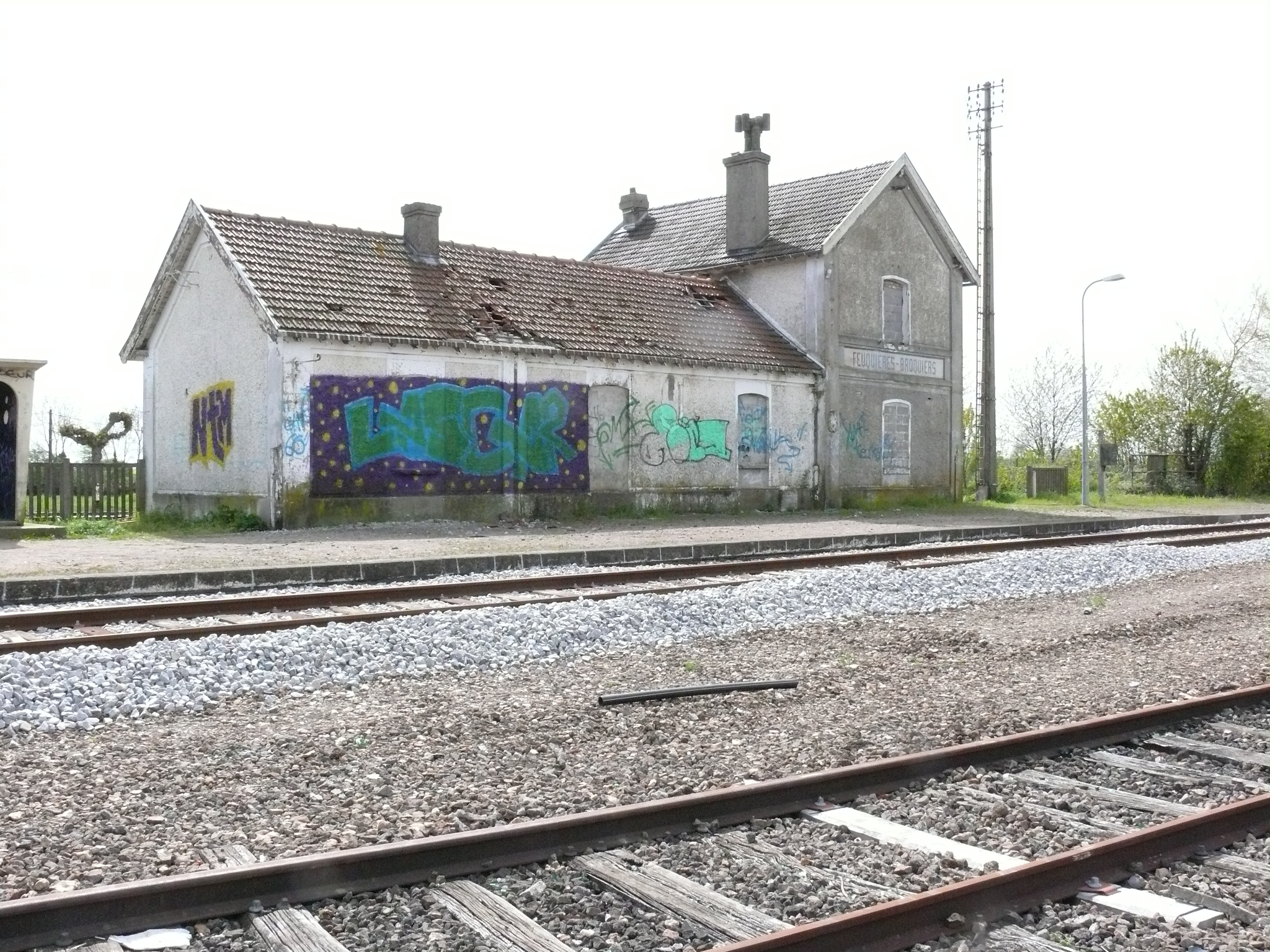 Gare de Feuquières-Broquiers (Oise, Picardie, France)